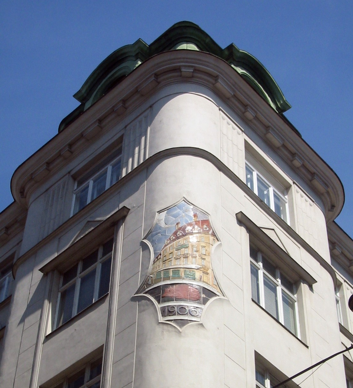 Brandstätte 8 in Wien, Mosaik "Gasthof zum Roten Igel"